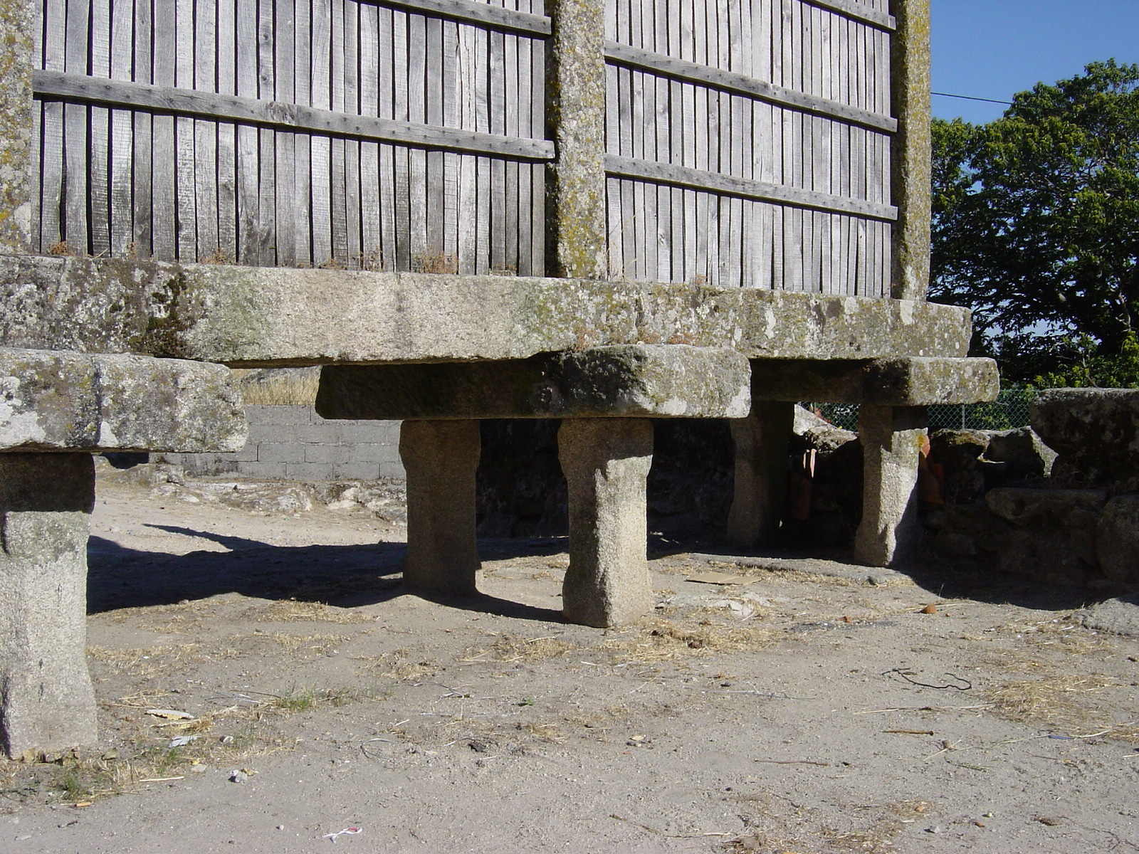 Detalhe de espigueiro em Guardão (Tondela, Viseu)